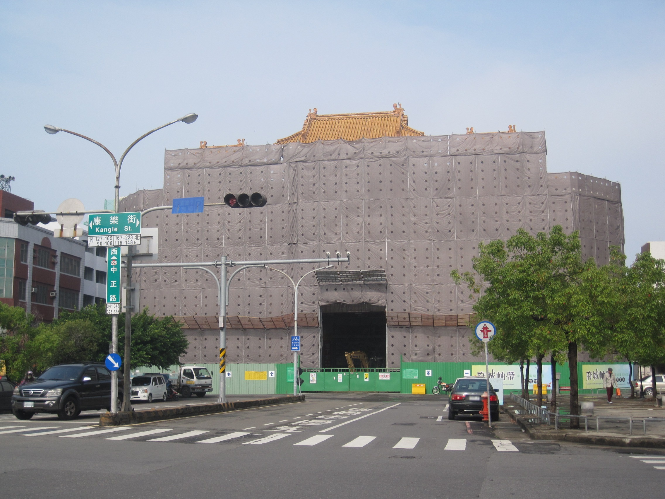 搭起圍籬進行拆除的臺南中國城。